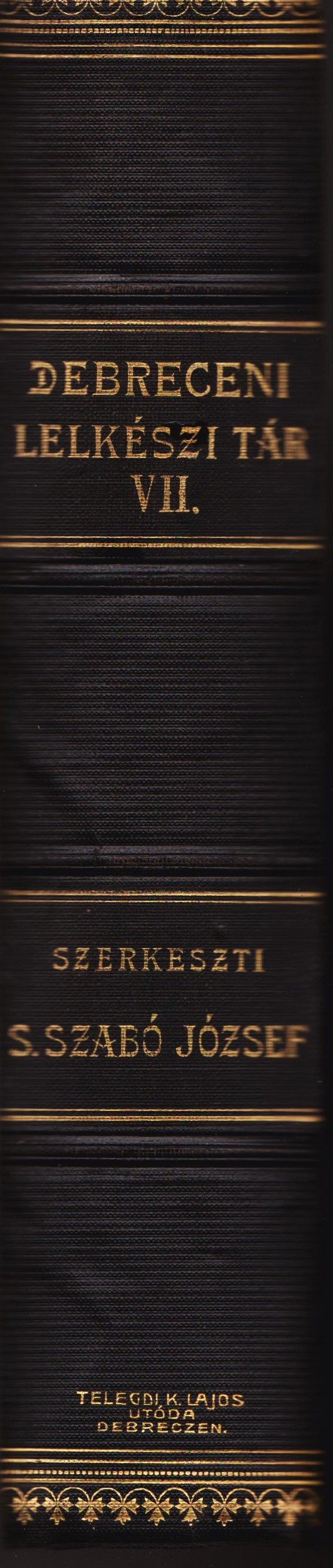 Debreczeni lelkészi tár, gerincdísz